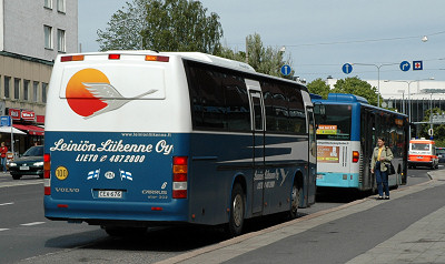 Leiniön Liikenteen bussi nro 6 Turussa Hämeenkadulla.